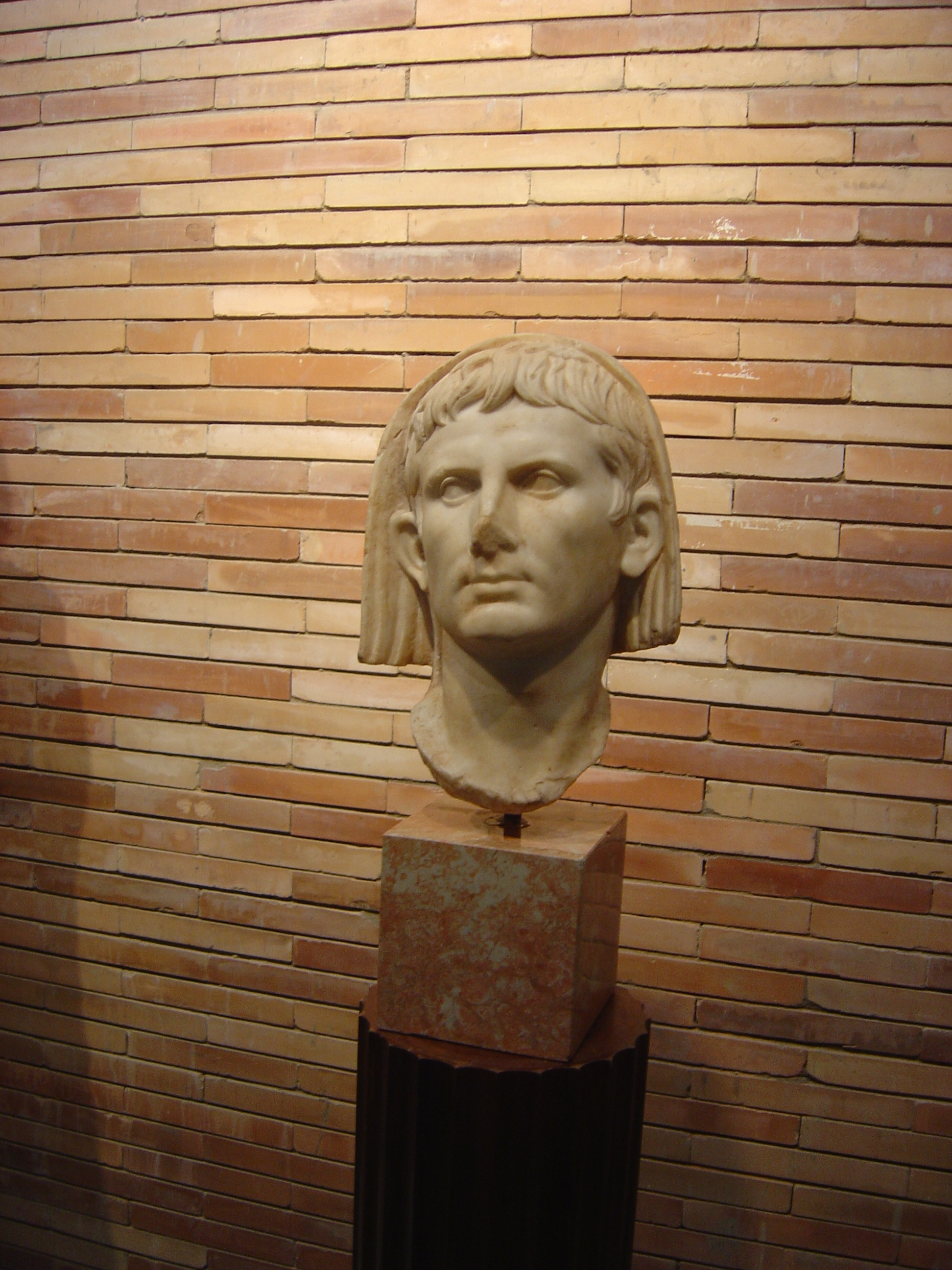 Cabeza de Augusto, Museo Nacional de Arte Romano (Mérida, Badajoz)